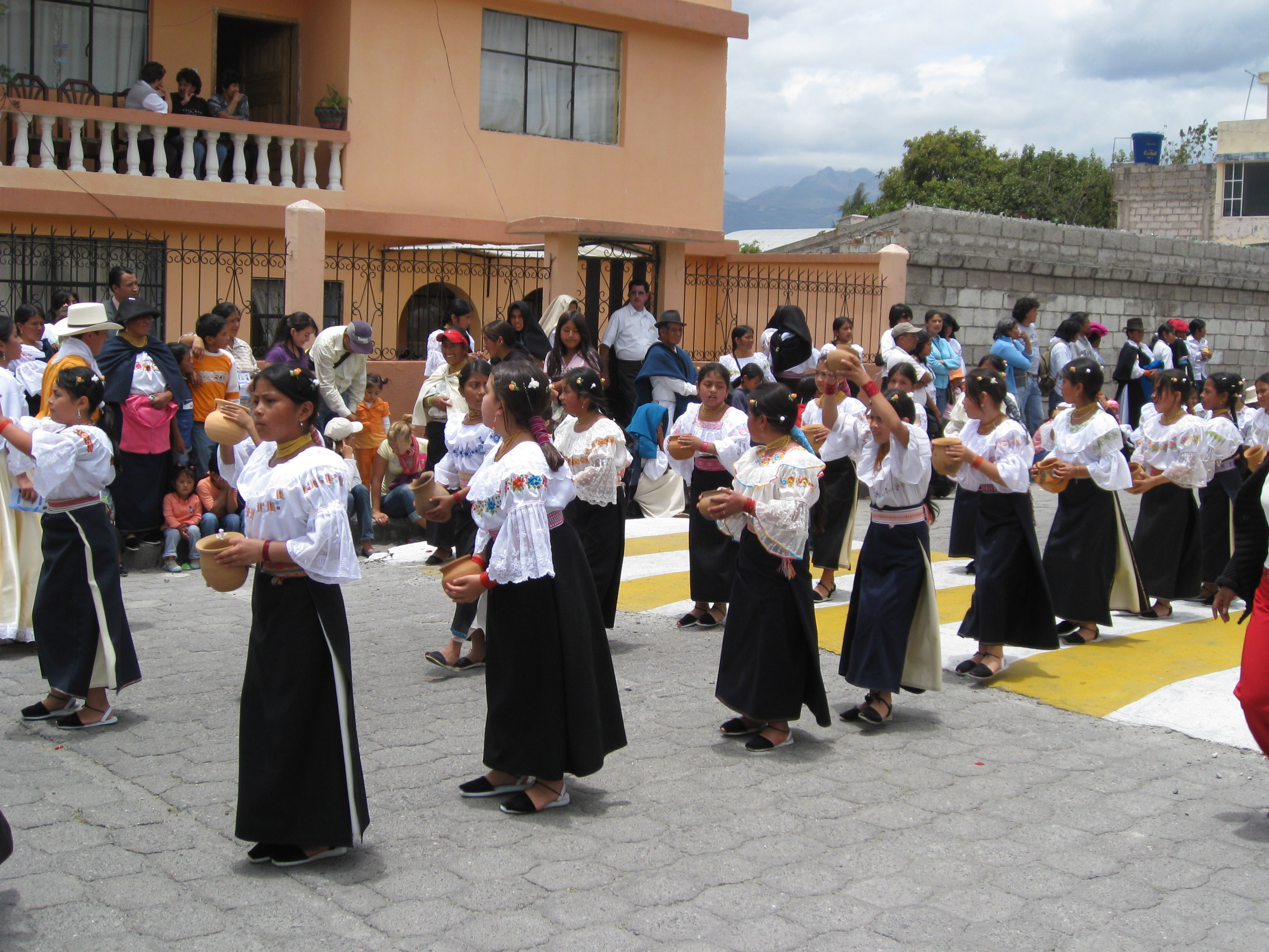 Jeunes-filles kichwa en costume traditionnel. Cotacachi, Équateur.